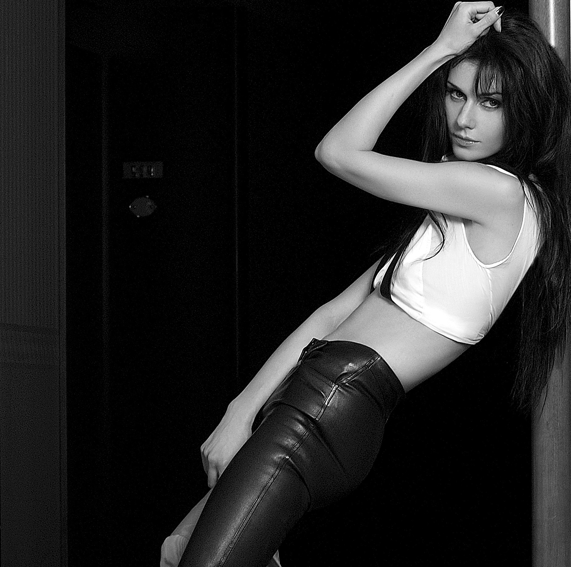 L'artiste lyrique néo-classique, auteur-compositeur-interprète et productrice française Emma Shapplin.